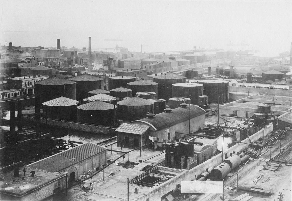 Баку. Конец 19-го века